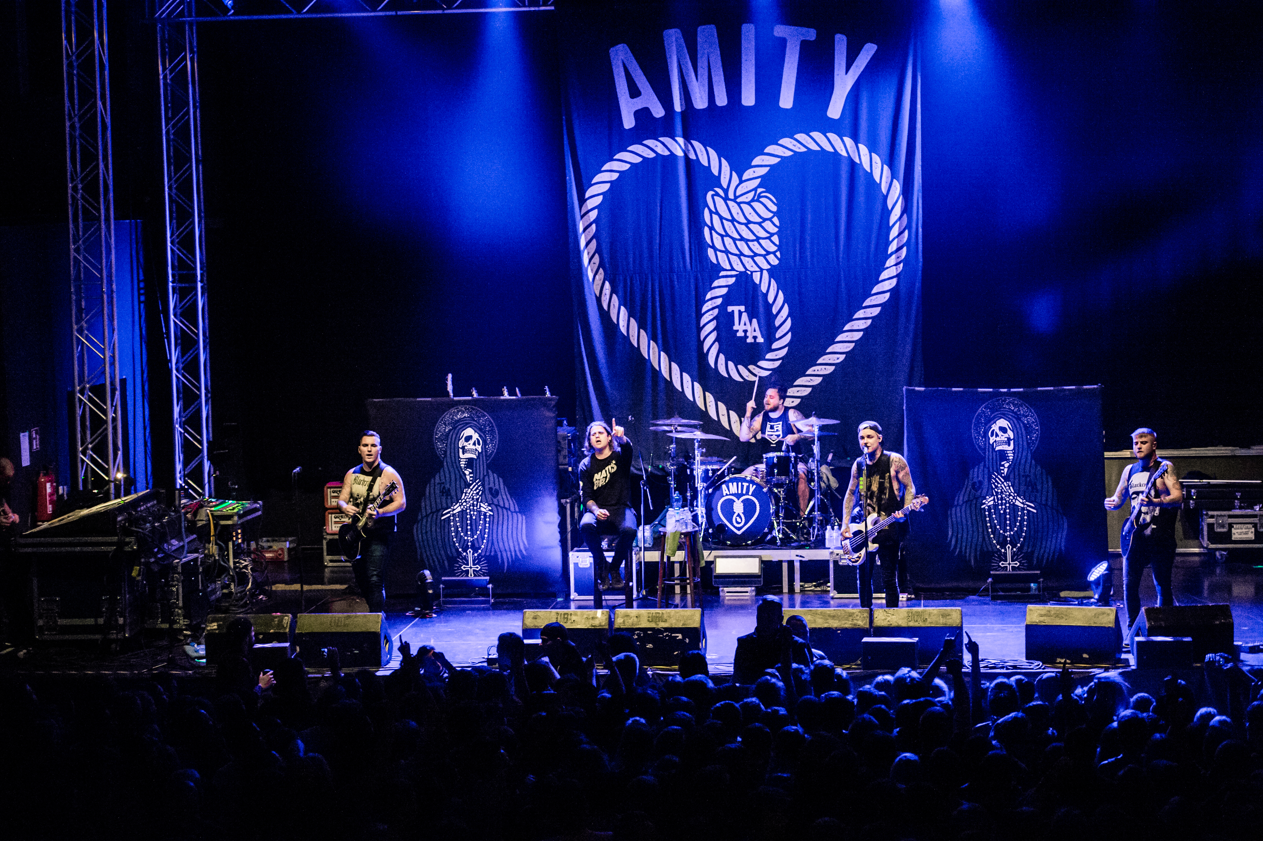 'The Amity Affliction - Impericon Never Say DIE! - Oberhausen'